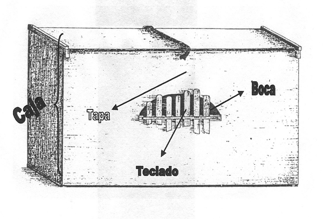 Diagrama tomado de REBOLLEDO KLOQUES, Octavio, El marimbol. Orígenes y presencia en México y el mundo, p. 142.